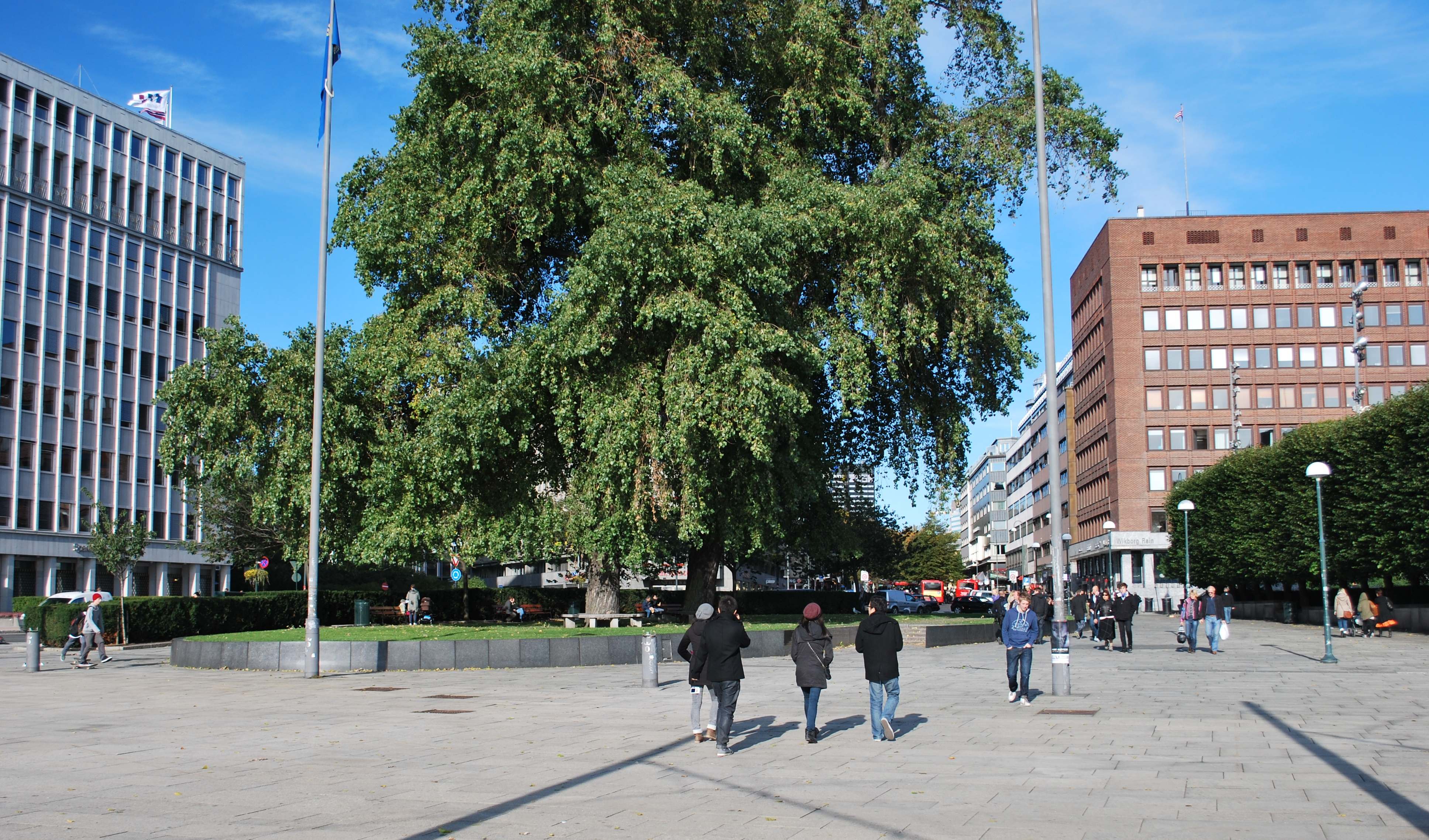 Olav Vs plass, Vika, Oslo sentrum, sett mot Olav Vs gate